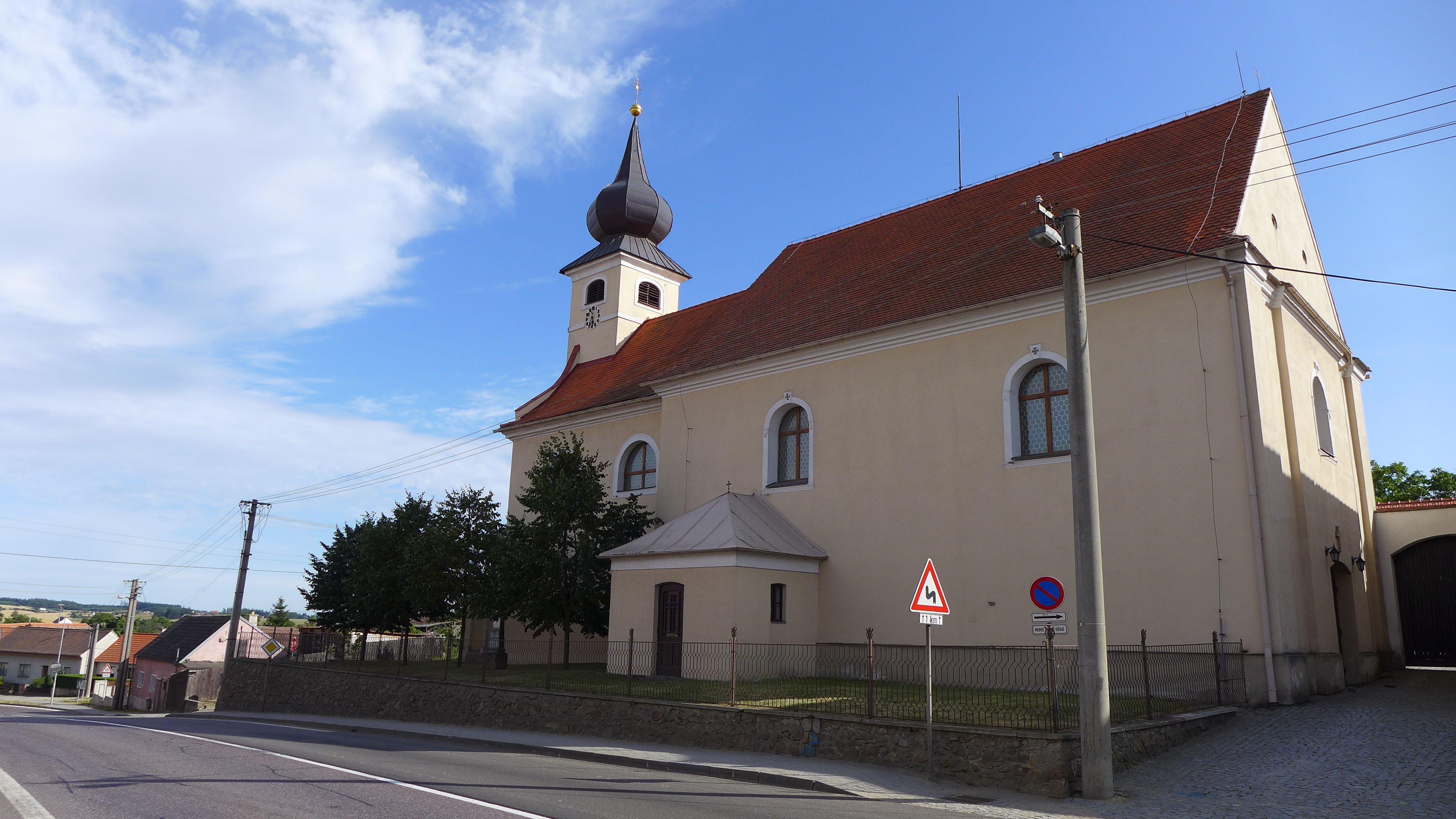 Kostel svatých Filipa a Jakuba, v obci, Pavlice.